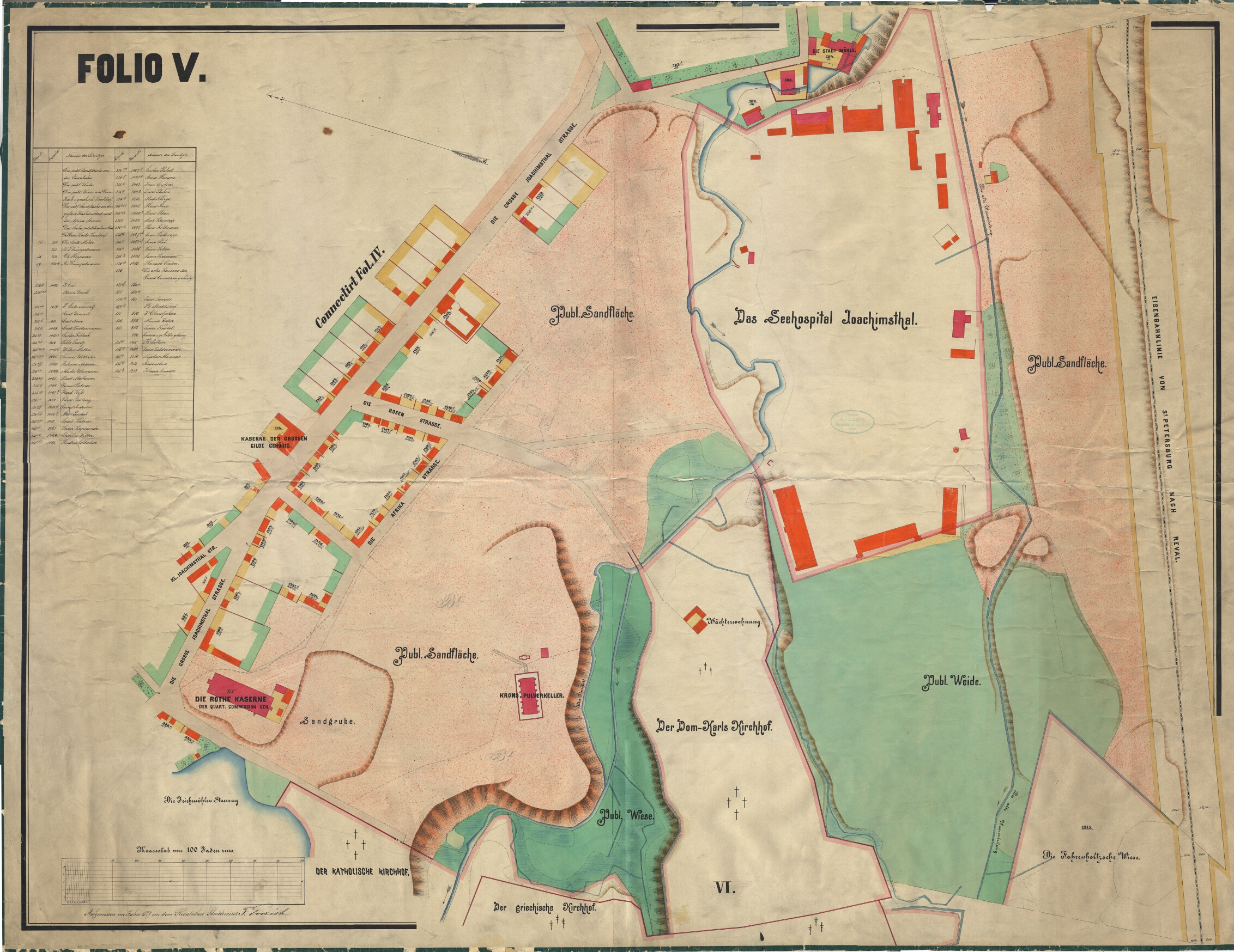 Fol V Die gr Joachimsthal, Afrika u. die Rosen Strasse. Die publ. Landfläche hinter d. Rothen Kaserne